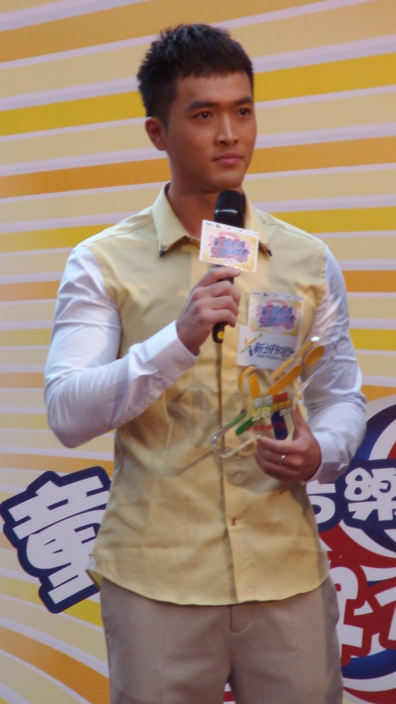 中文（香港）: 陳國峰的樣子